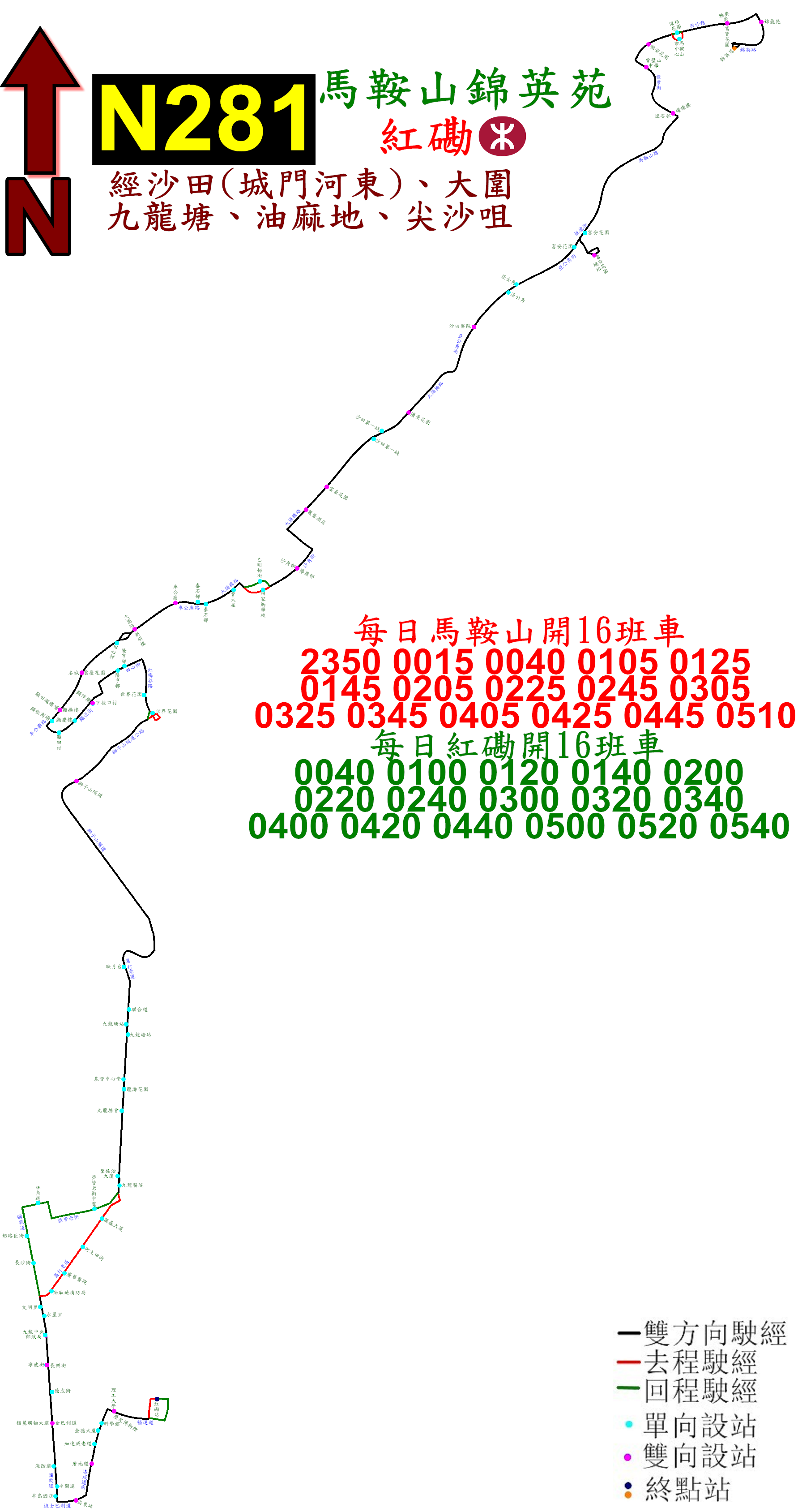 中文（香港）: 九巴N281線的走線圖